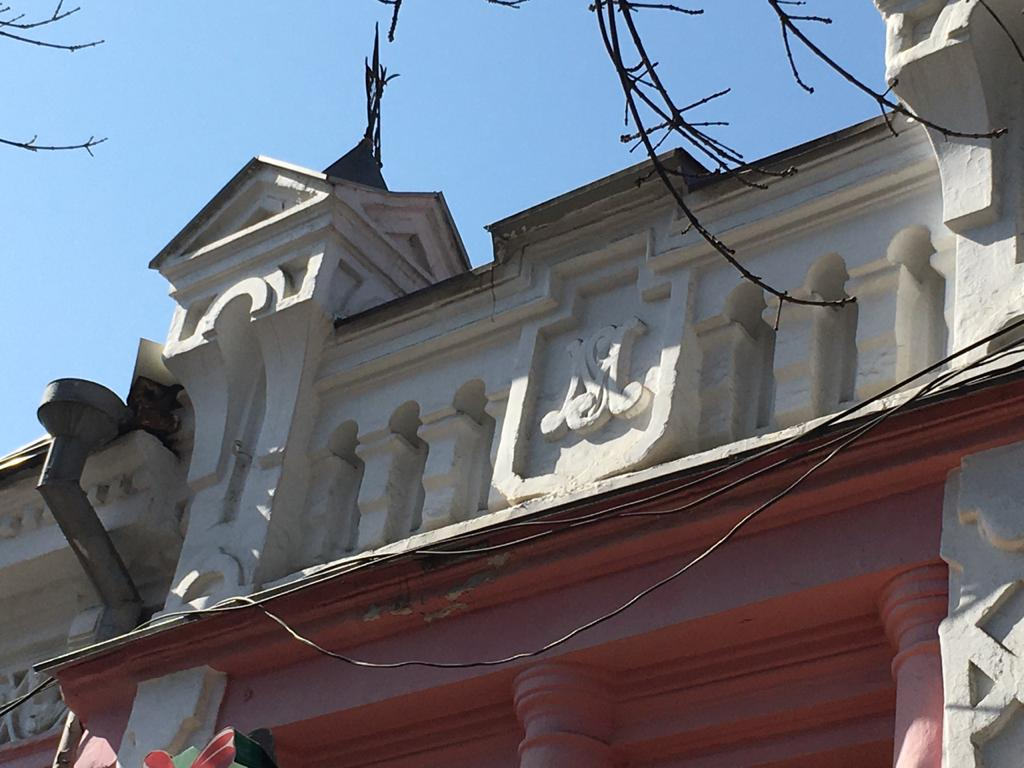 Дом С. Миткевич: улица Ленина, 31, Владикавказ, Северная Осетия